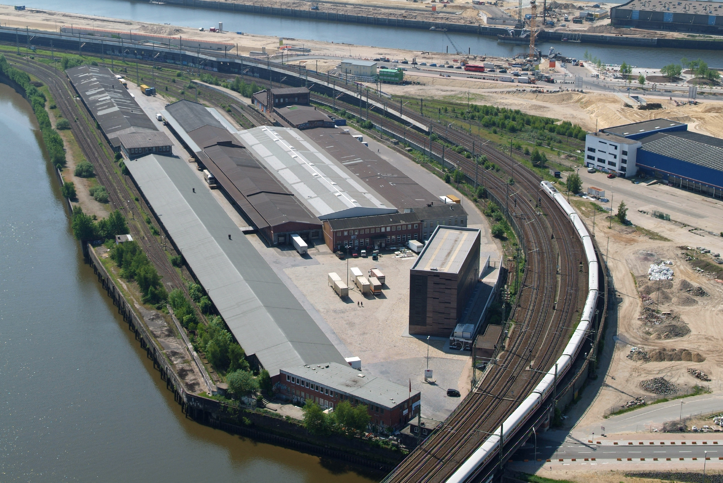 Projekt Heißluftballon Reste des Hauptgüterbahnhofs am Oberhafen (links), hinter der Bahnstrecke das Erschließungsgebiet der HafenCity, am oberen Bildrand der Baakenhafen